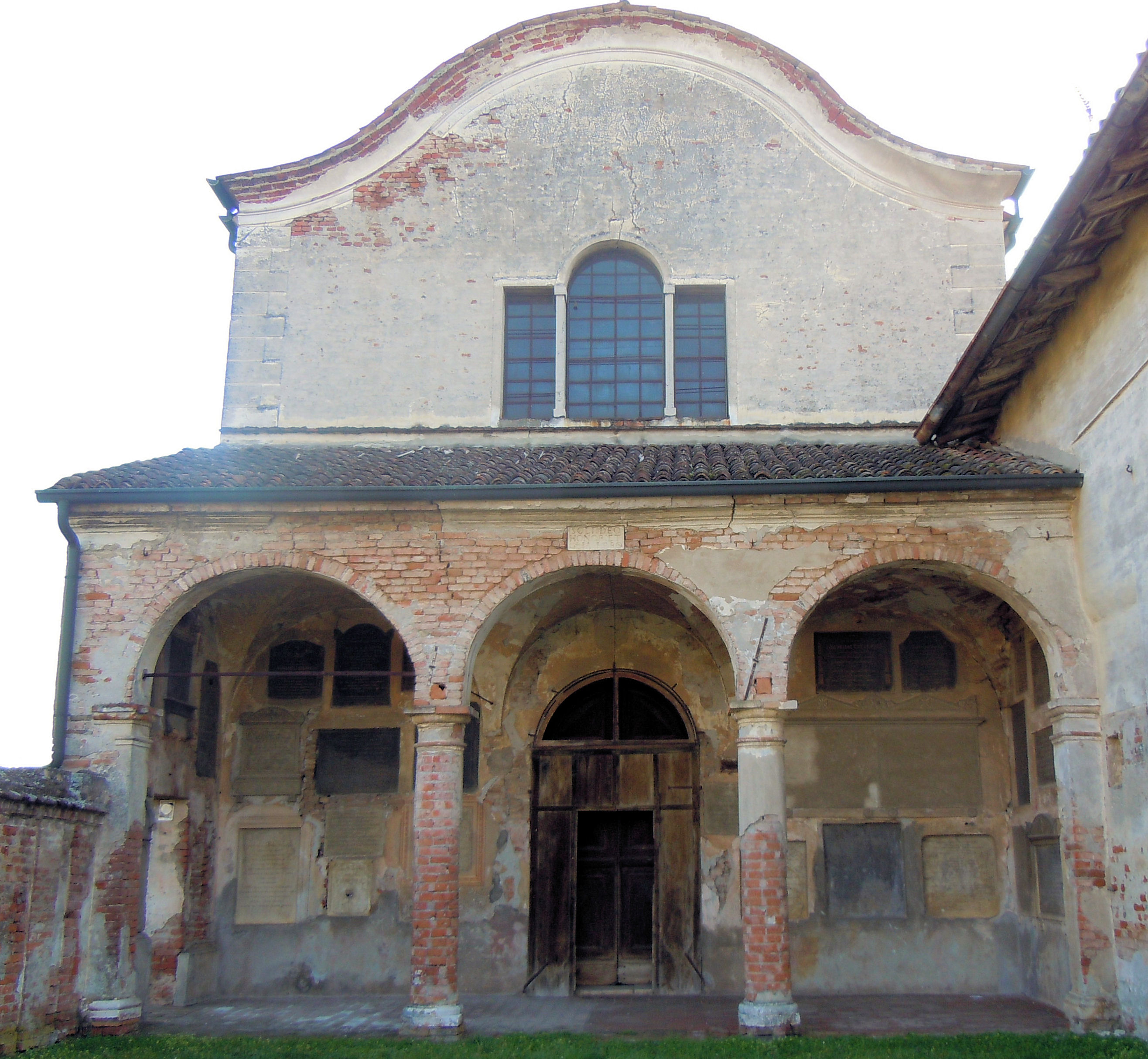 Ostiano, Pieve di San Gaudenzio.